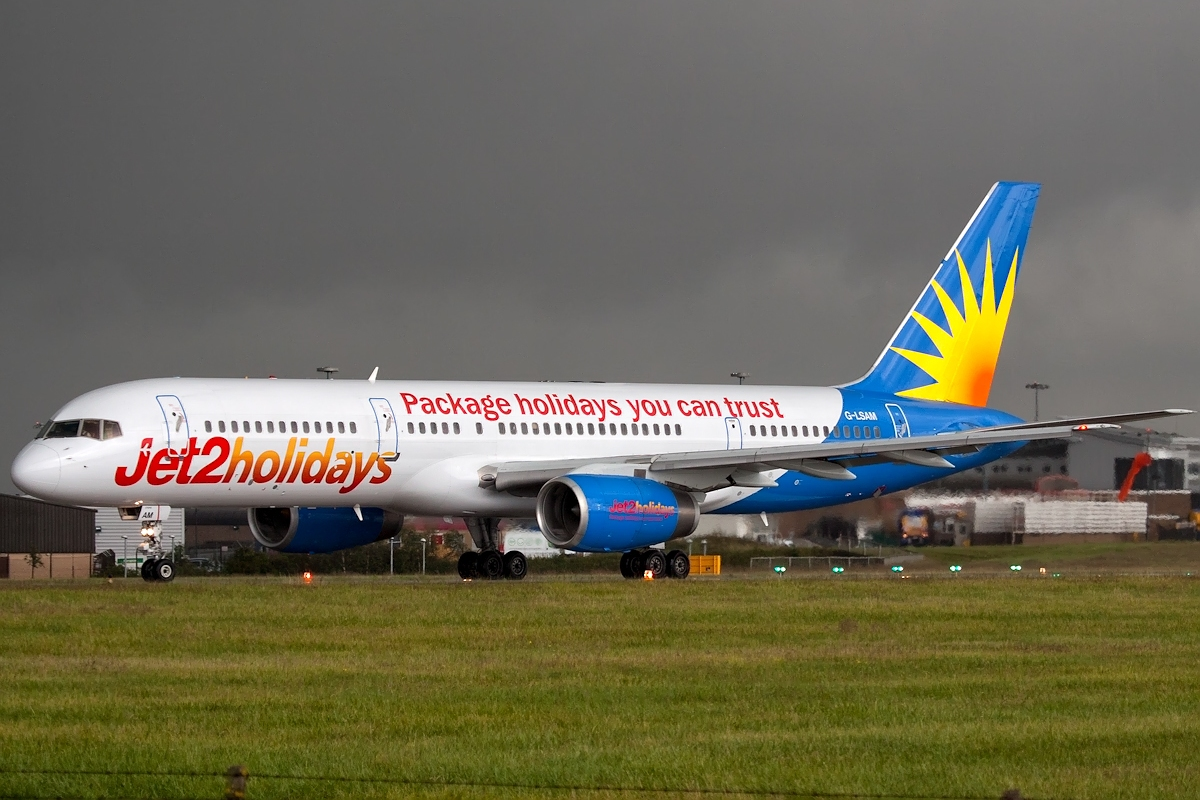 G-LSAM - 400510 - Jet2 - Boeing 757-204 (26966)